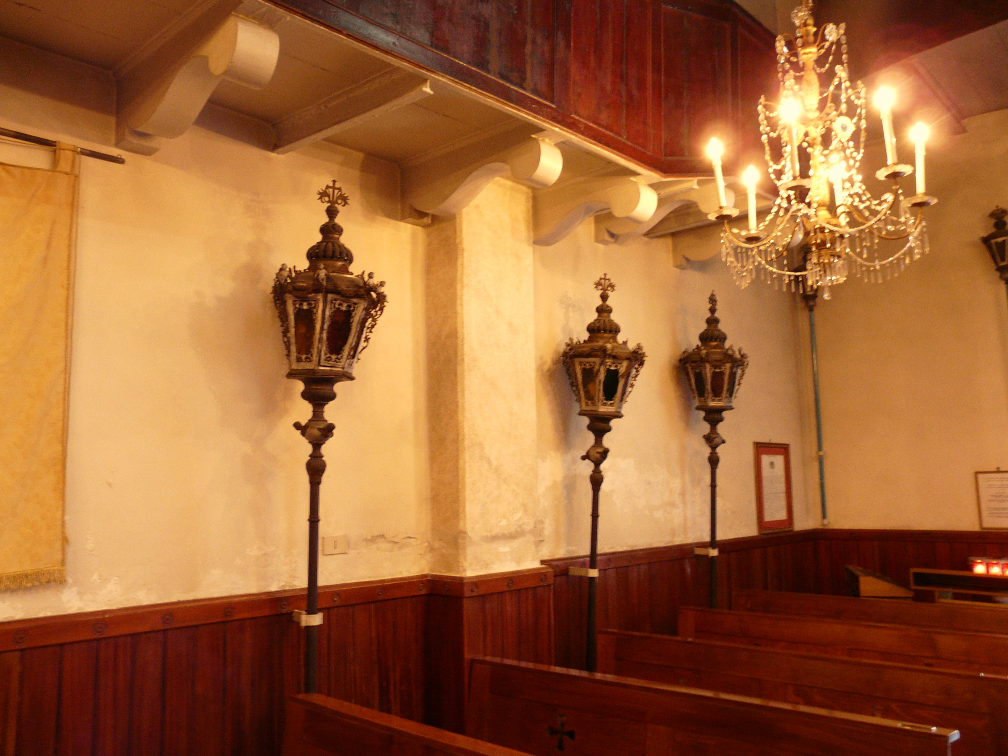 Elementi processionali dell'Oratorio di Santa Maria Assunta o dei Disciplinanti, Riomaggiore, Cinque Terre, La Spezia, Liguria, Italia